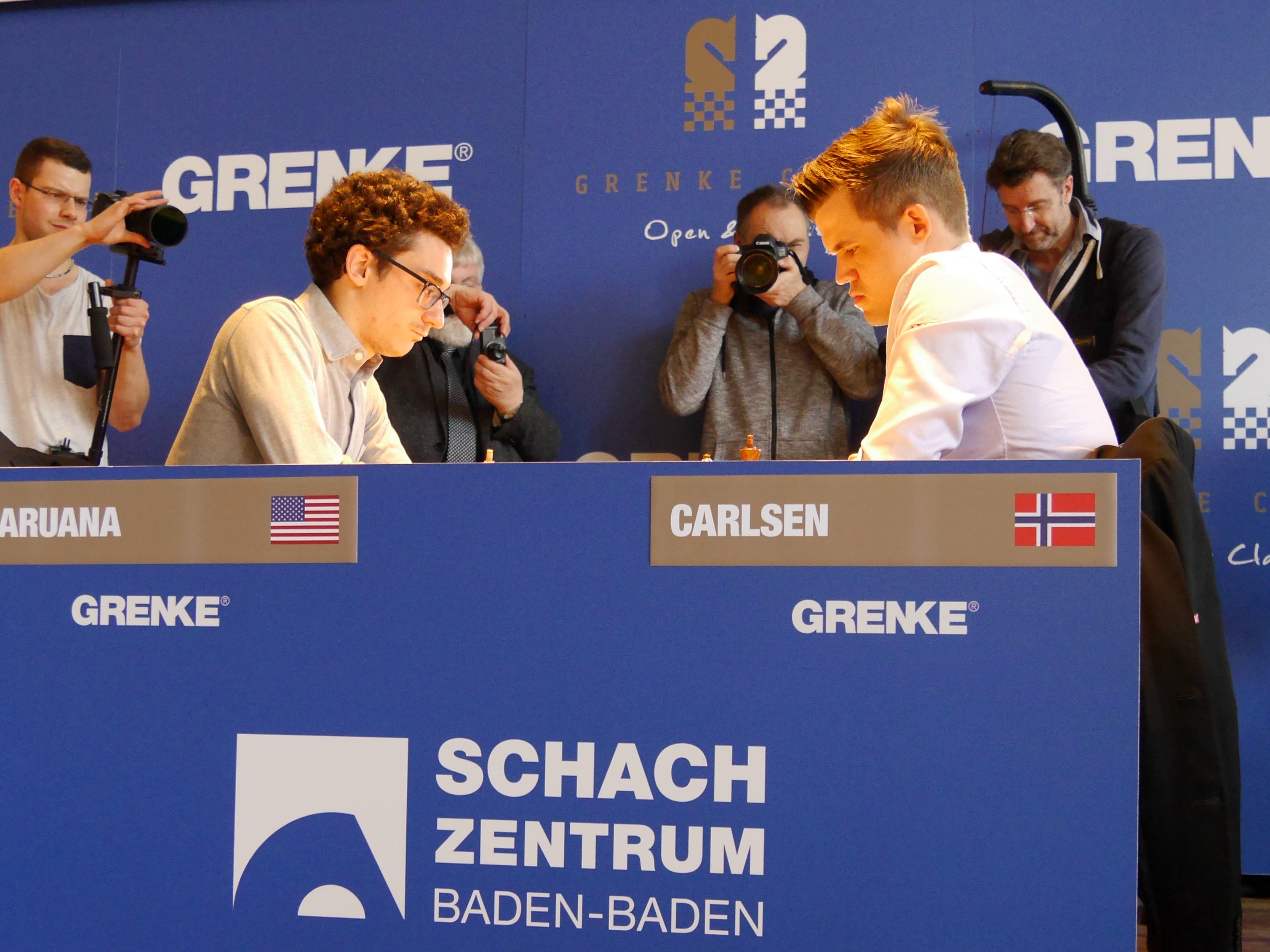 Fabiano Caruana gegen Magnus Carlsen, Brett 1 Runde 1 in Karlsruhe, Grenke Chess Classic 2018.